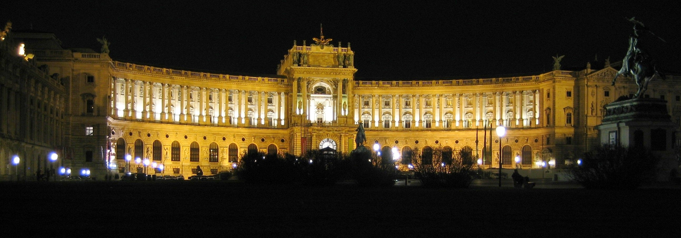 Wien_Hofburg_bei_Nacht